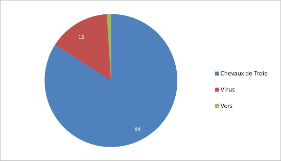 Malware graphic